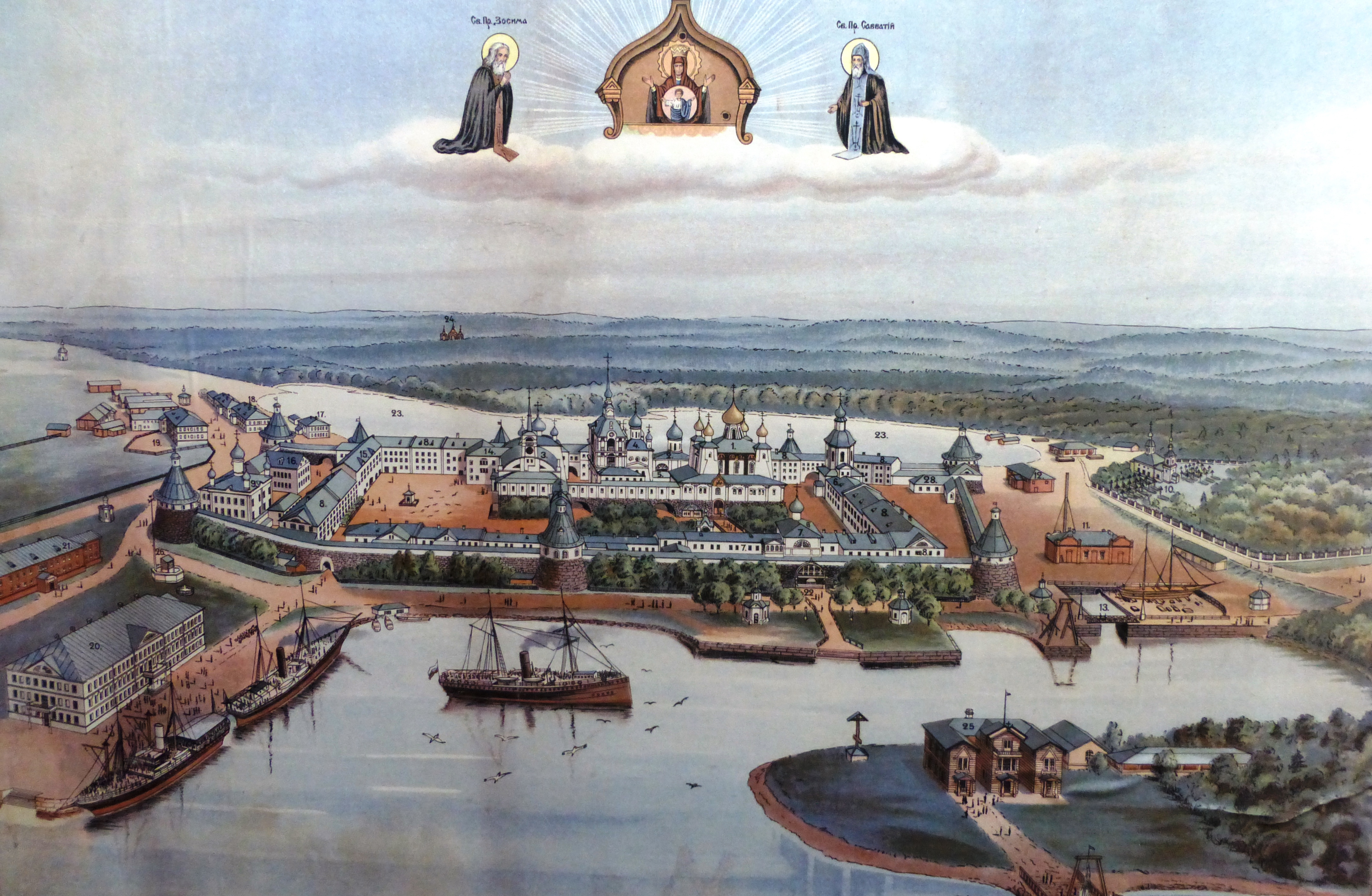 Соловецкий монастырь. Литография (конец XIX-начало XX вв) в музейной экспозиции монастыря.